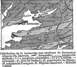 Les affleurements de kersantite dans les parages de la Rade de Brrst (La Grande Encyclopédie 1885-1902)